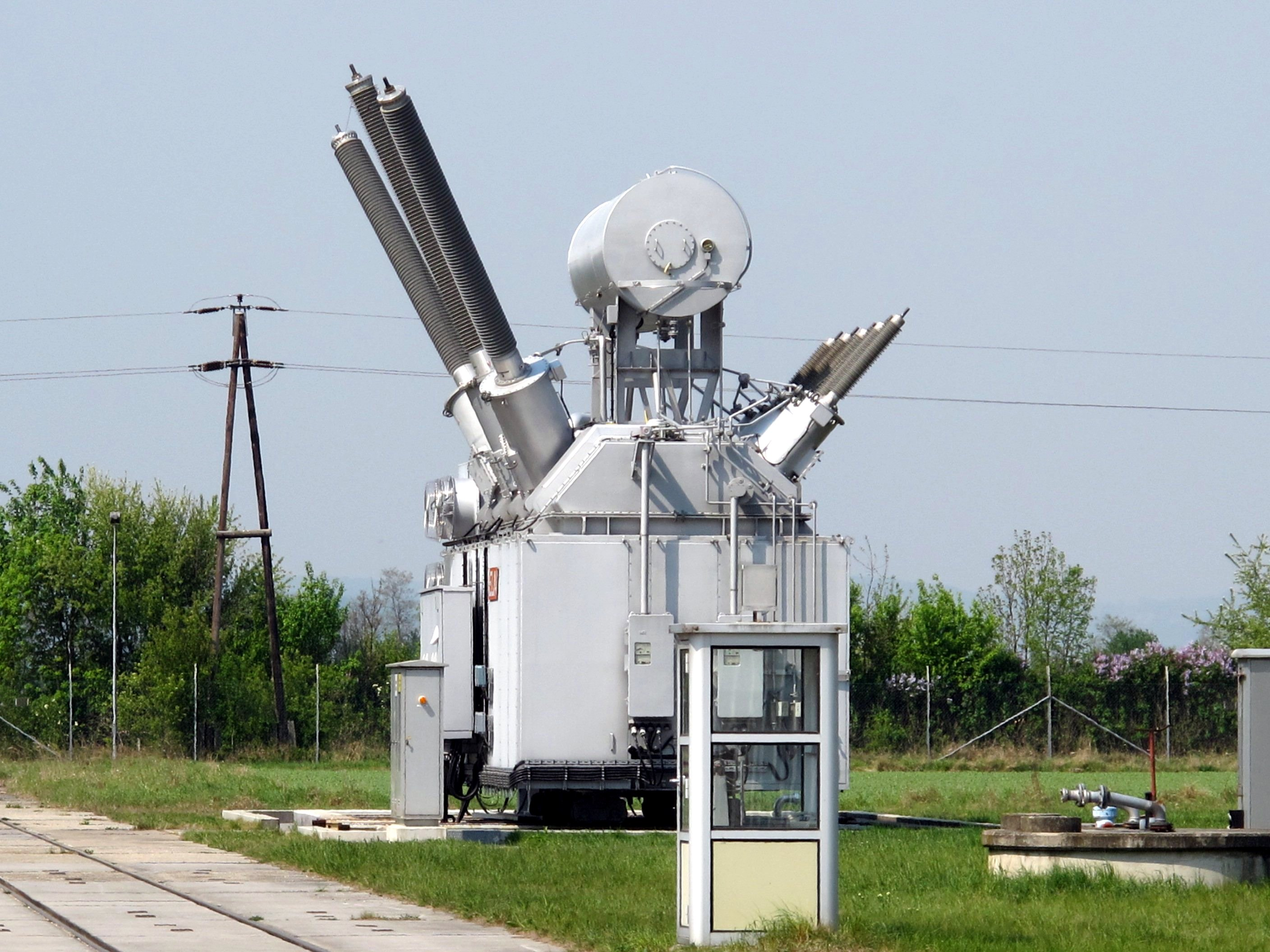 Umspannwerk Dürnrohr; Nicht mehr in Betrieb befindlicher Leistungstransformator (Stromrichtertransformator) der ehemaligen GKK Dürnrohr am Betriebsgelände